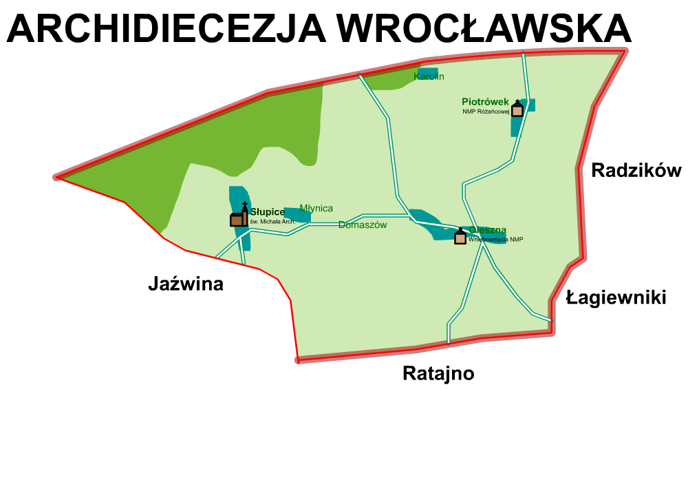 Mapa parafii św. Michała Archanioła w Słupicach (dekanat Dzierżoniów, diecezja świdnicka)